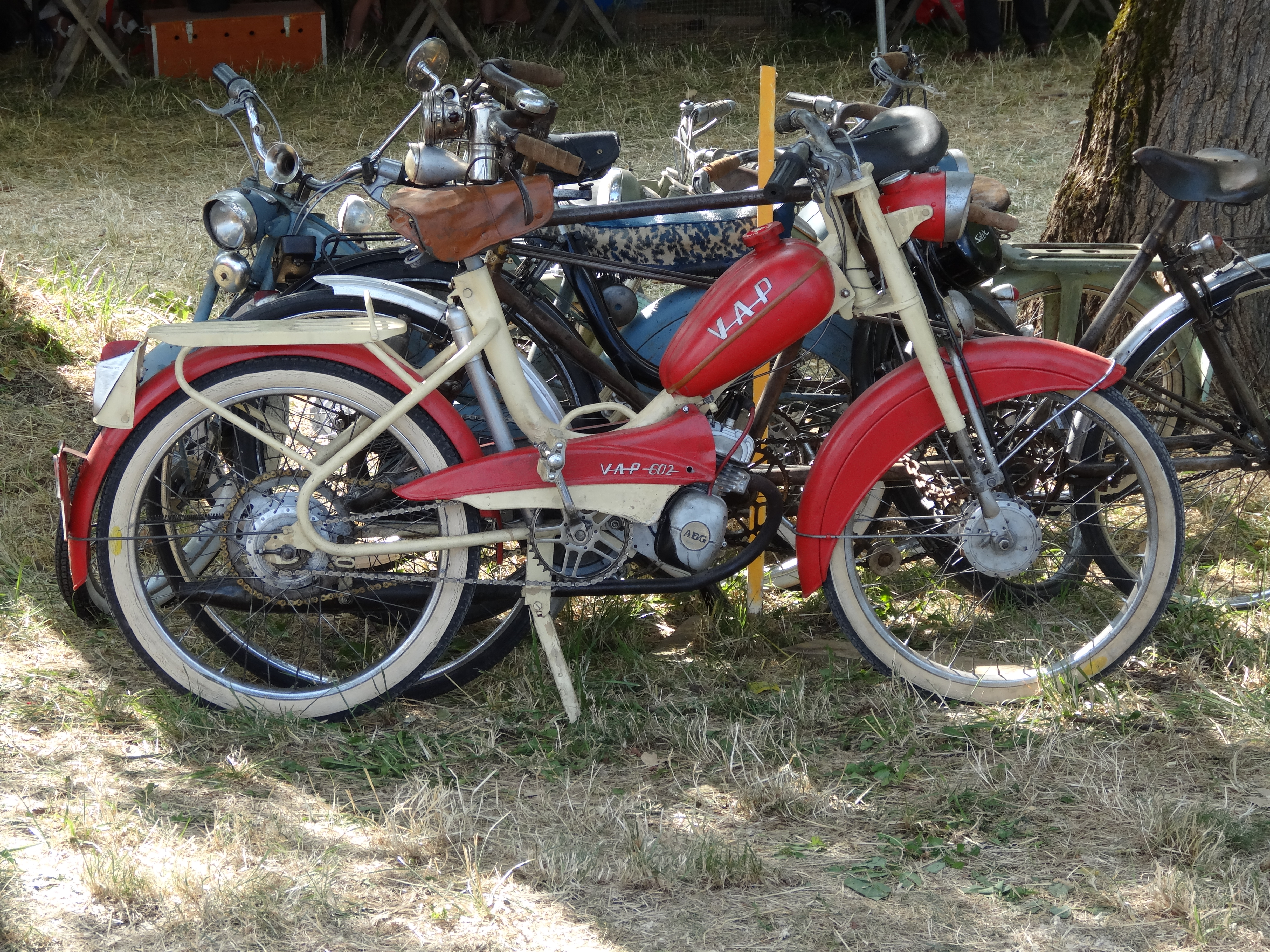 Mobylette VAP 602 exposée à la fête de la Batteuse de Bettant (2016)